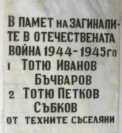 Паметна плоча, монтирана върху фасадата на Кметството в село Славяново, Поповско, посветена на загиналите славяновчани през Втората световна война - 2006 год.